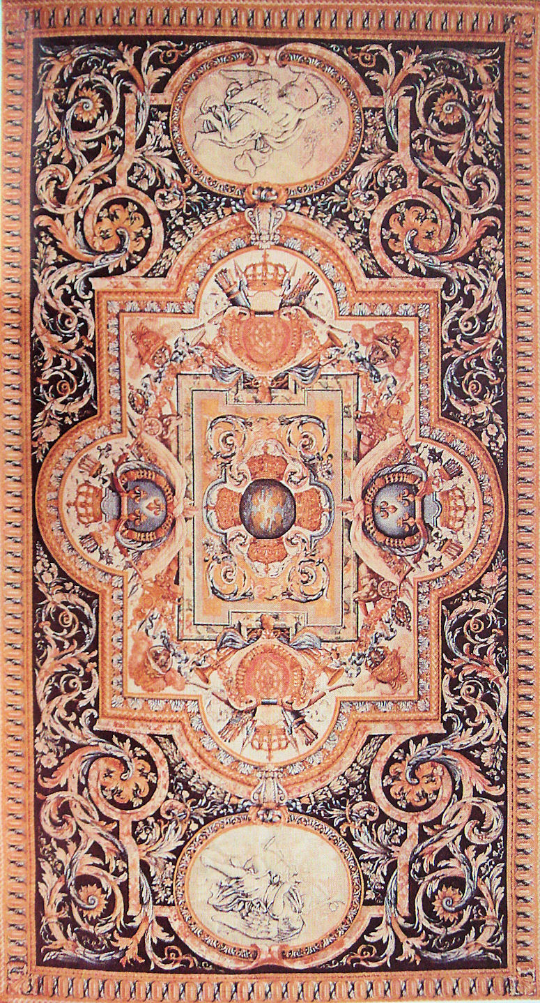 Tapis de sol de la Manufacture de la Savonnerie d'époque Louis XIV d'apres un carton de Charles Le Brun, crée pour la Grande Galerie du Louvre.